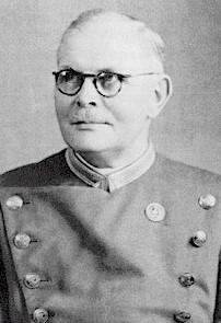 Københavns Post-Orkesters første formand